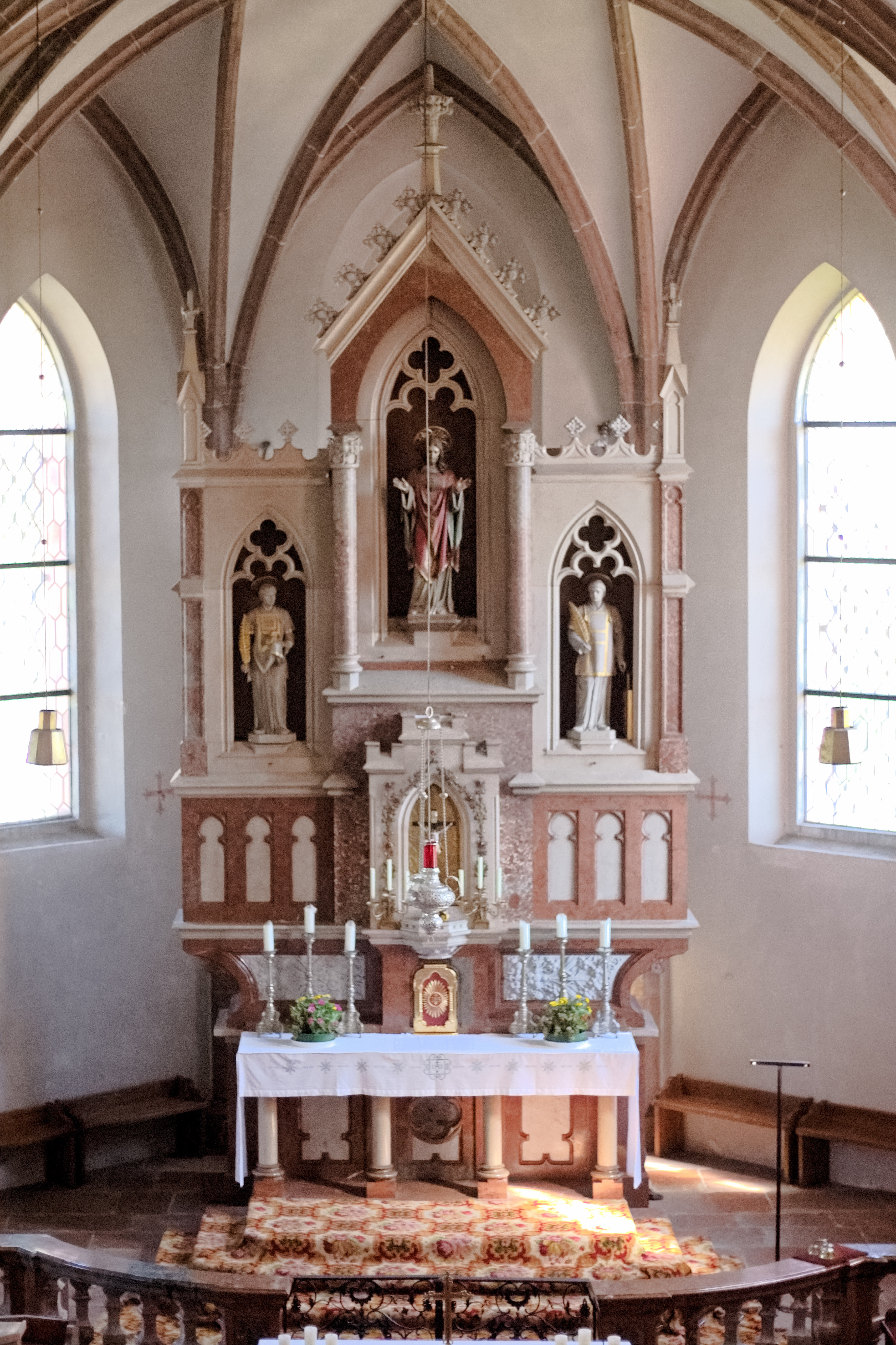 Hauptaltar der Pfarrkirche Adnet (Bezirk Hallein, Land Salzburg)